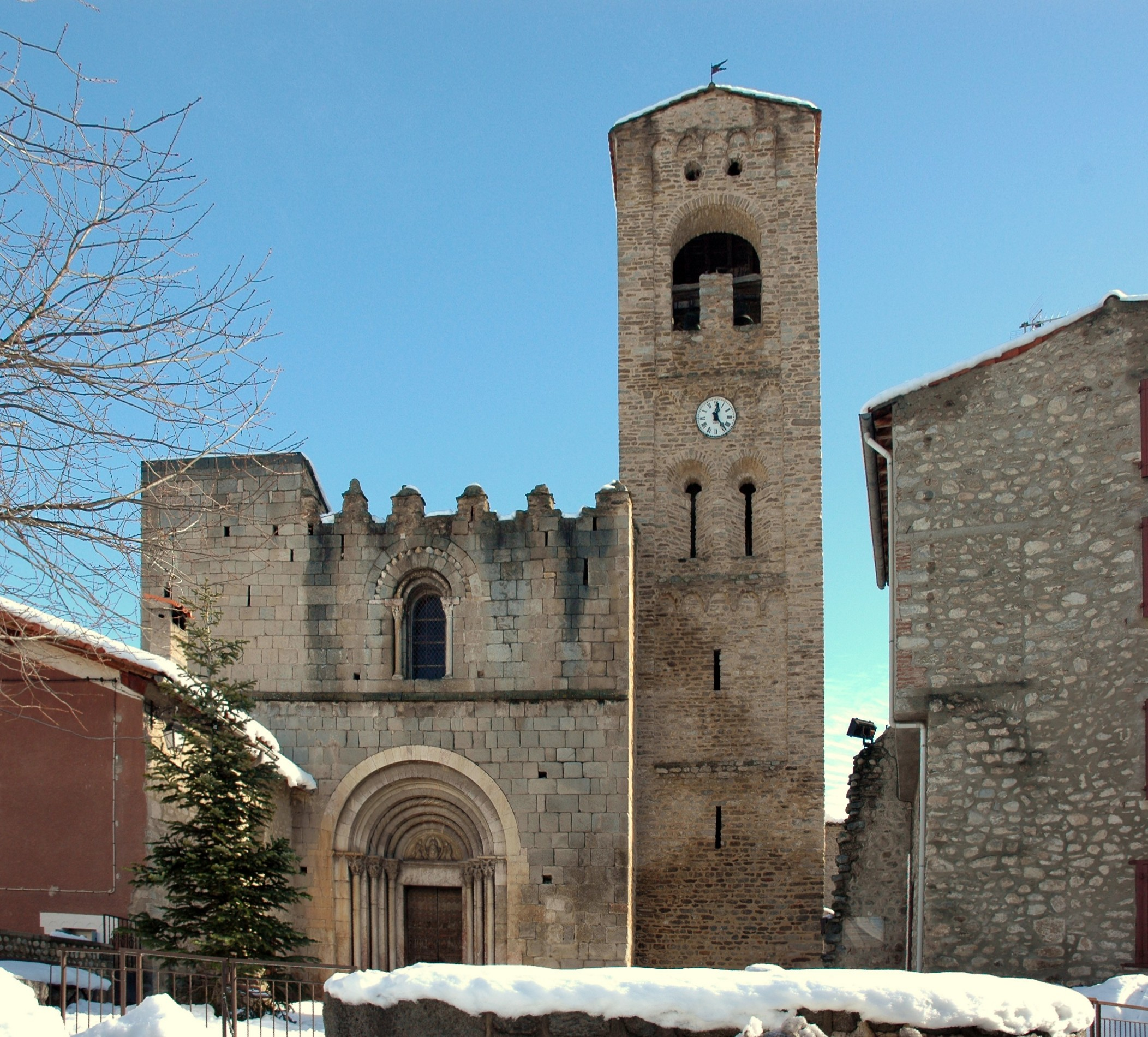 Santa Maria de Cornellà de Conflent - Façana principal